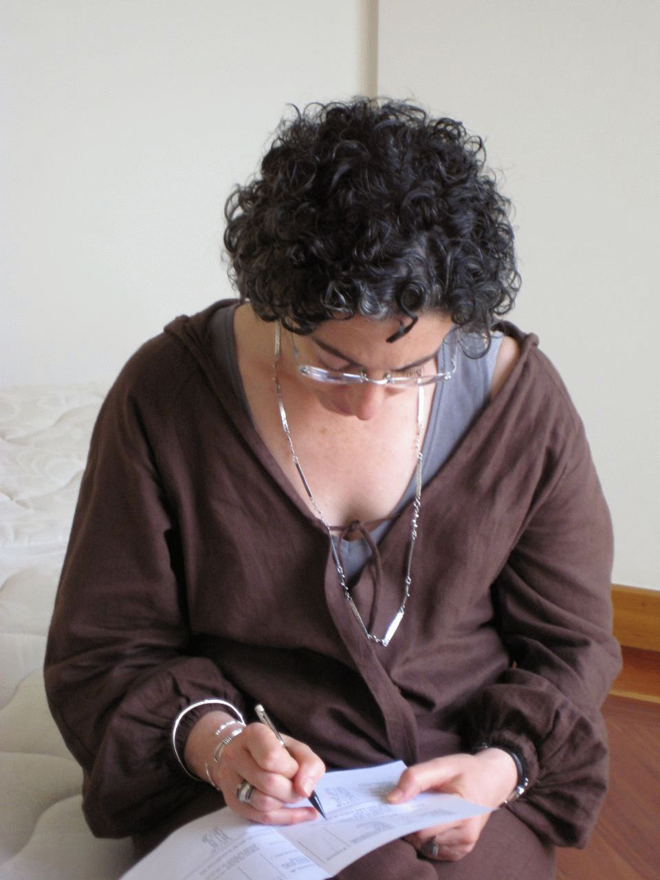 Barbara Jacobs, escritora mexicana